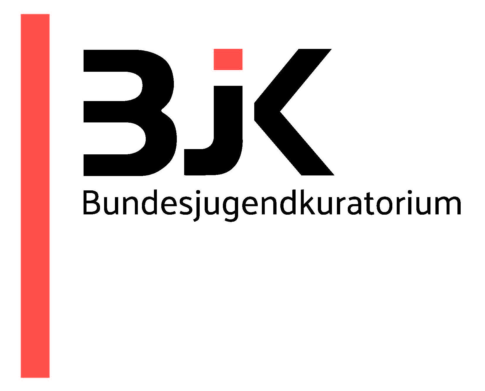 Das aktuelle Logo des Bundesjugendkuratoriums